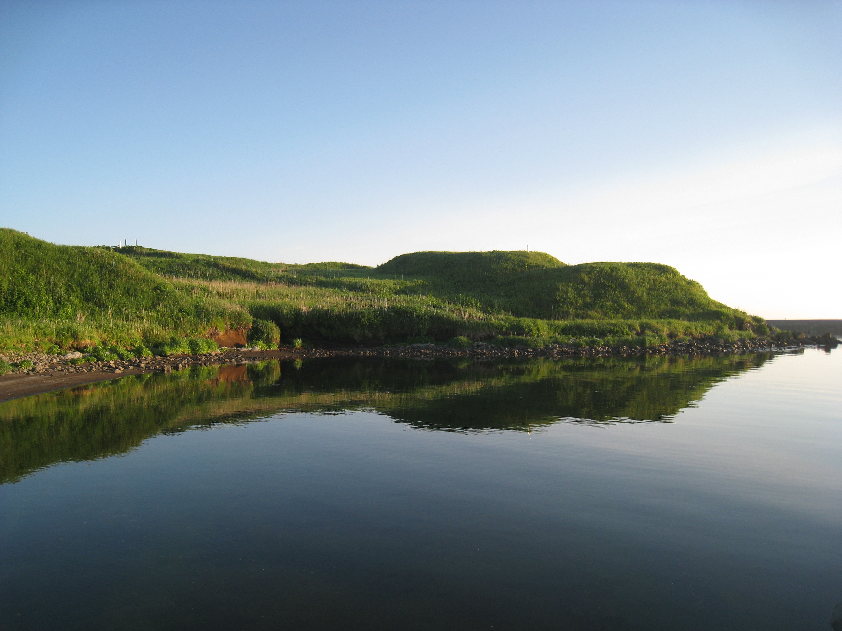 温根元漁港から望んだオンネモトチャシ（根室半島チャシ跡群）。2009年6月28日撮影。